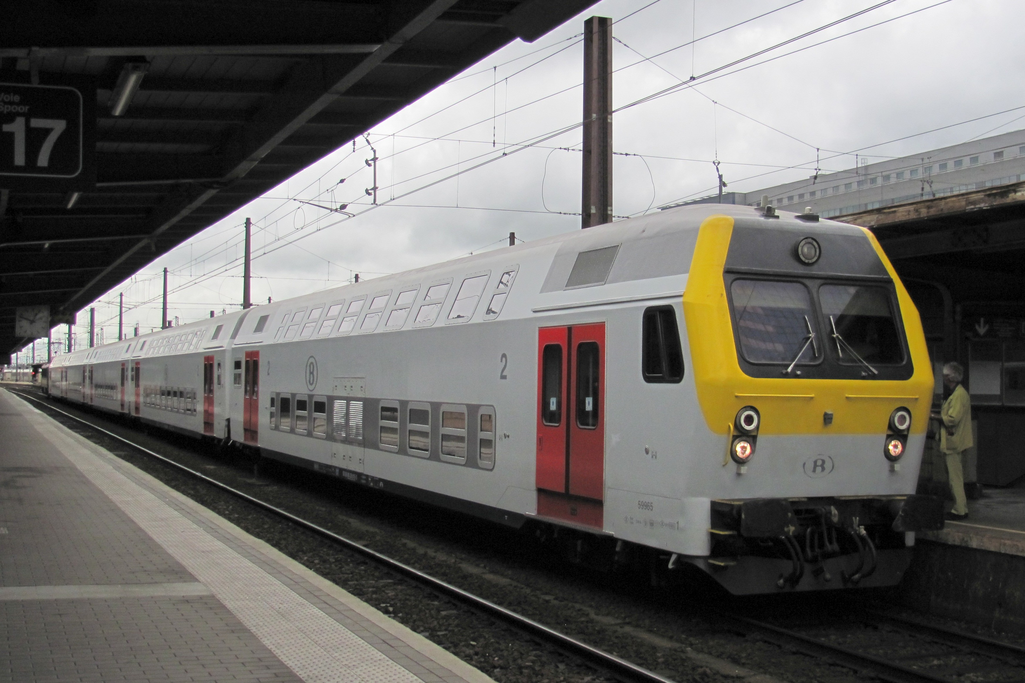 M5-Doppelstockwagen der belgischen Bahn nach Modernisierung im Bahnhof Brüssel-Süd/Midi. / Belgian M5-coach after refurbishment at Brussels-South/Midi railway station / Vernieuwde M5-rijtuig te Brussel-Zuid